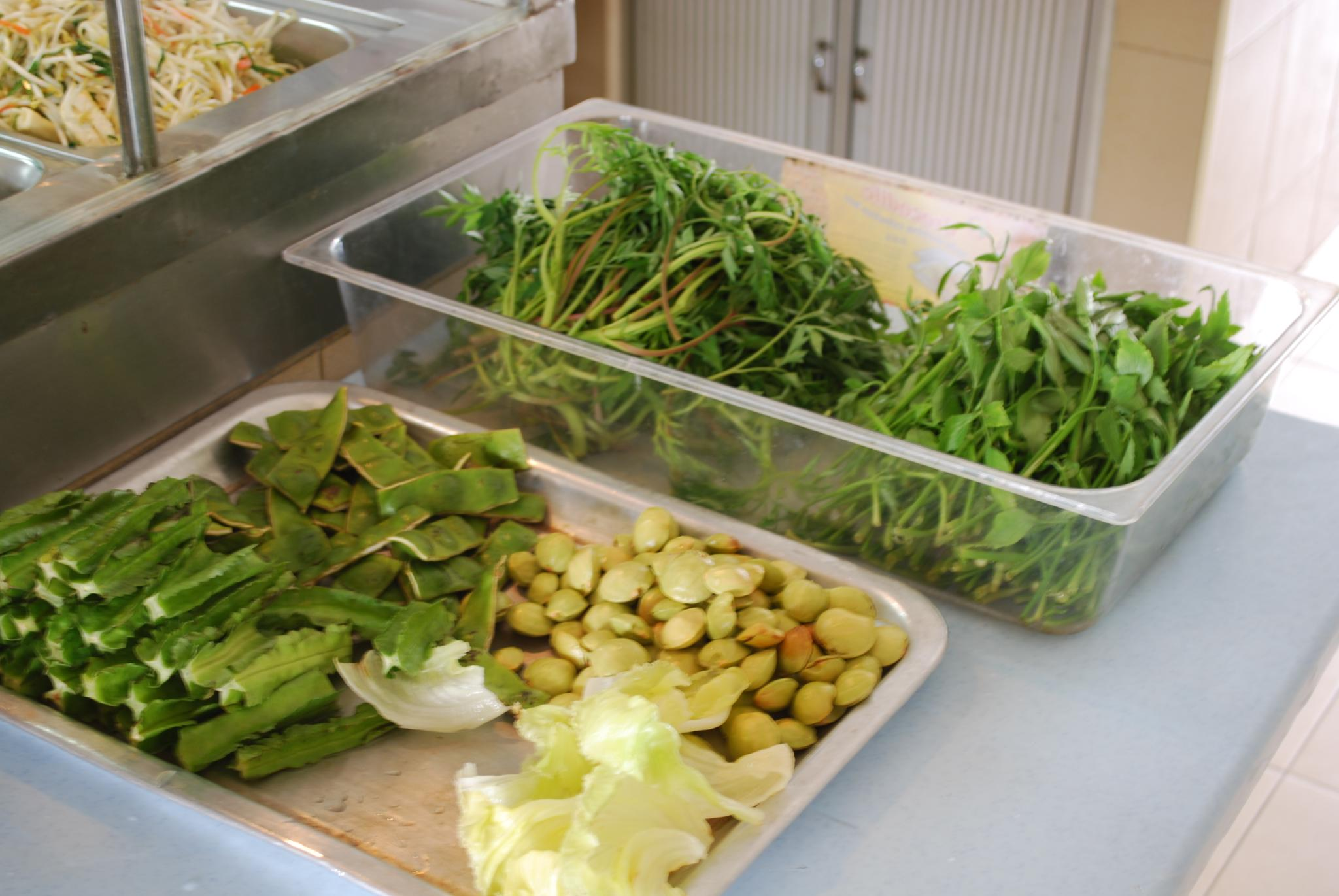 Ulam salad, eaten with a sambal chilli dip.